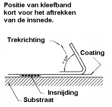 Hechttape Peel off